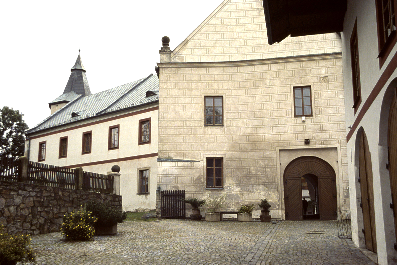 Castle of Žirovnice, okres Pelhřímov, Vysočina, Czech Republic (yard)